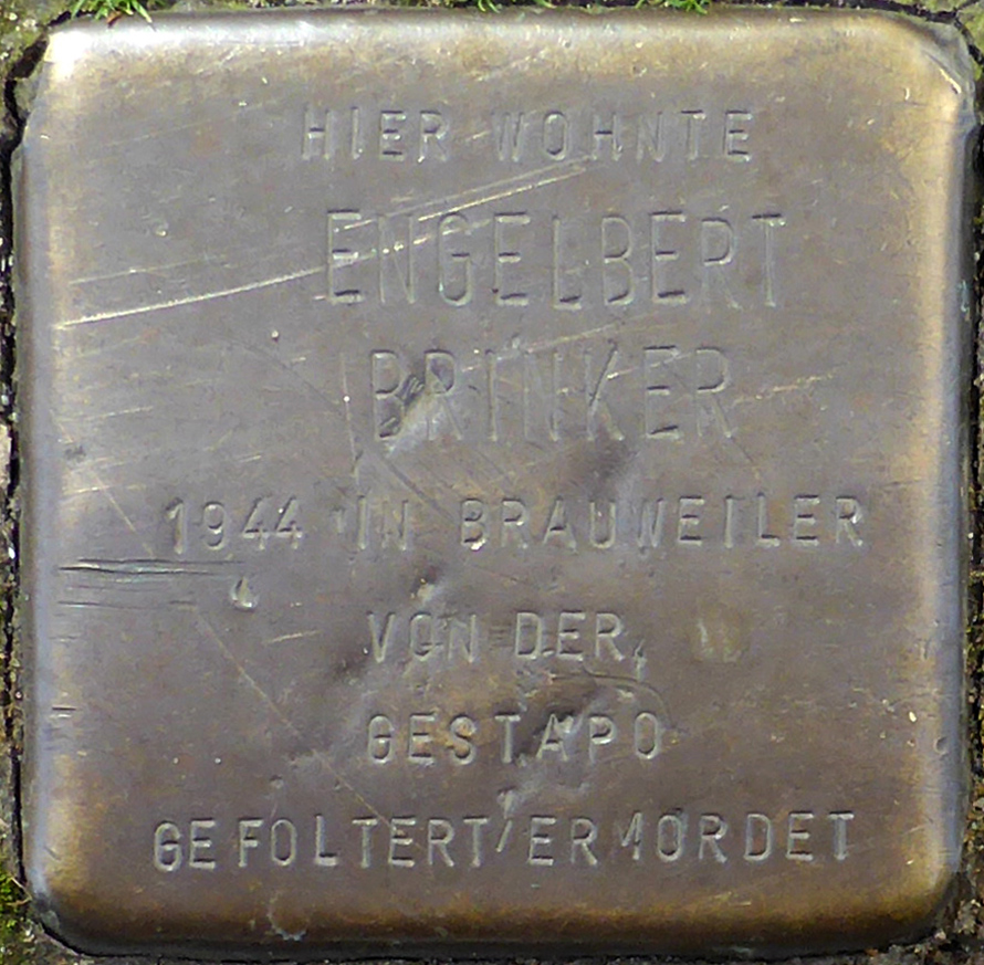 Stolperstein: Engelbert Brinker (Im Dau 4), Köln.